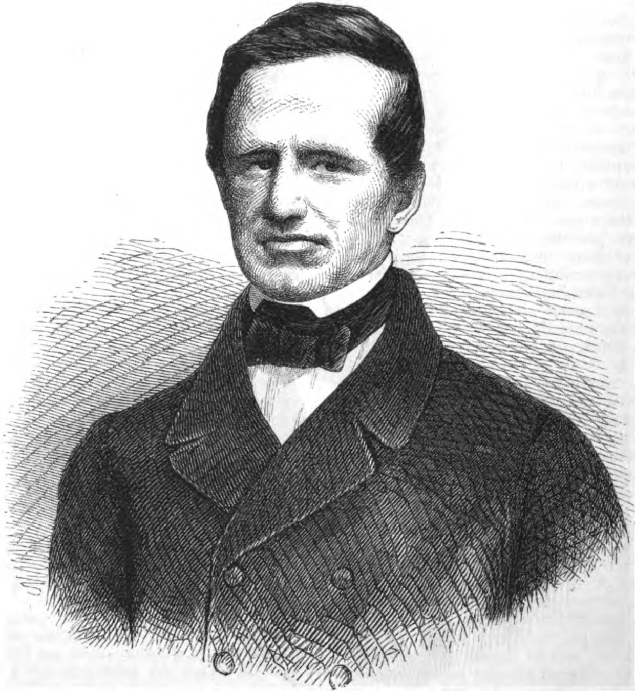 Louis Friedrich Oskar Schwarze, deutscher Jurist und Politiker im 19. Jh.